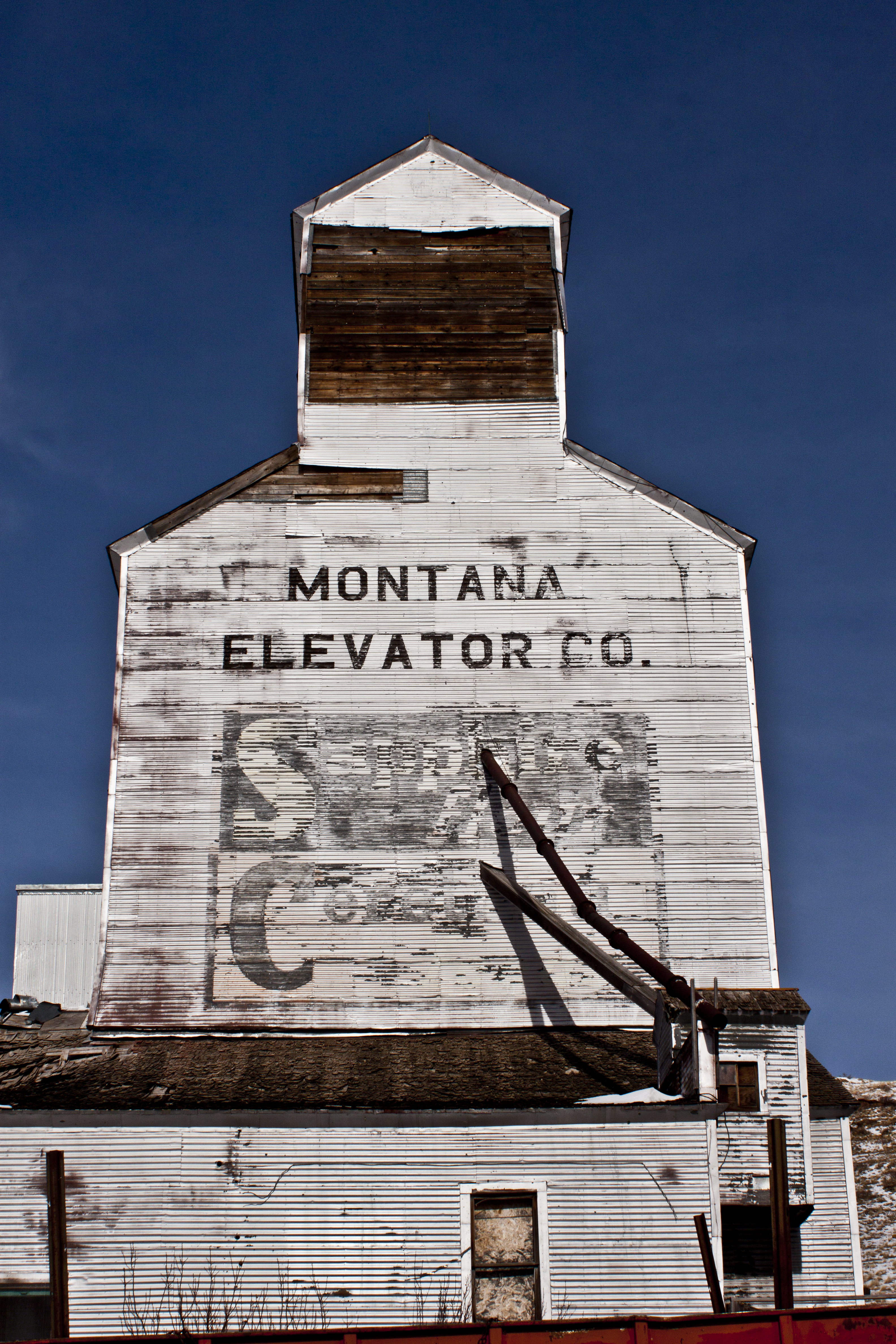 Historic Montana Elevator Co. elevator in Raynesford, Montana.